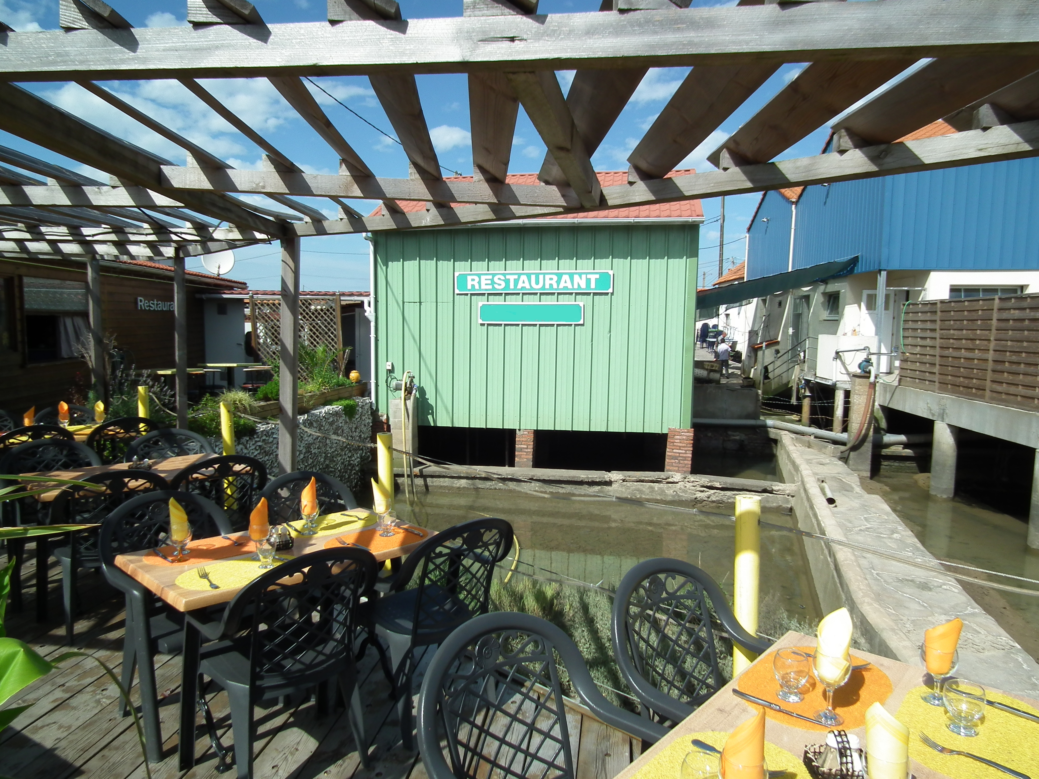 Terrasses de restaurants sur le port de La Tremblade